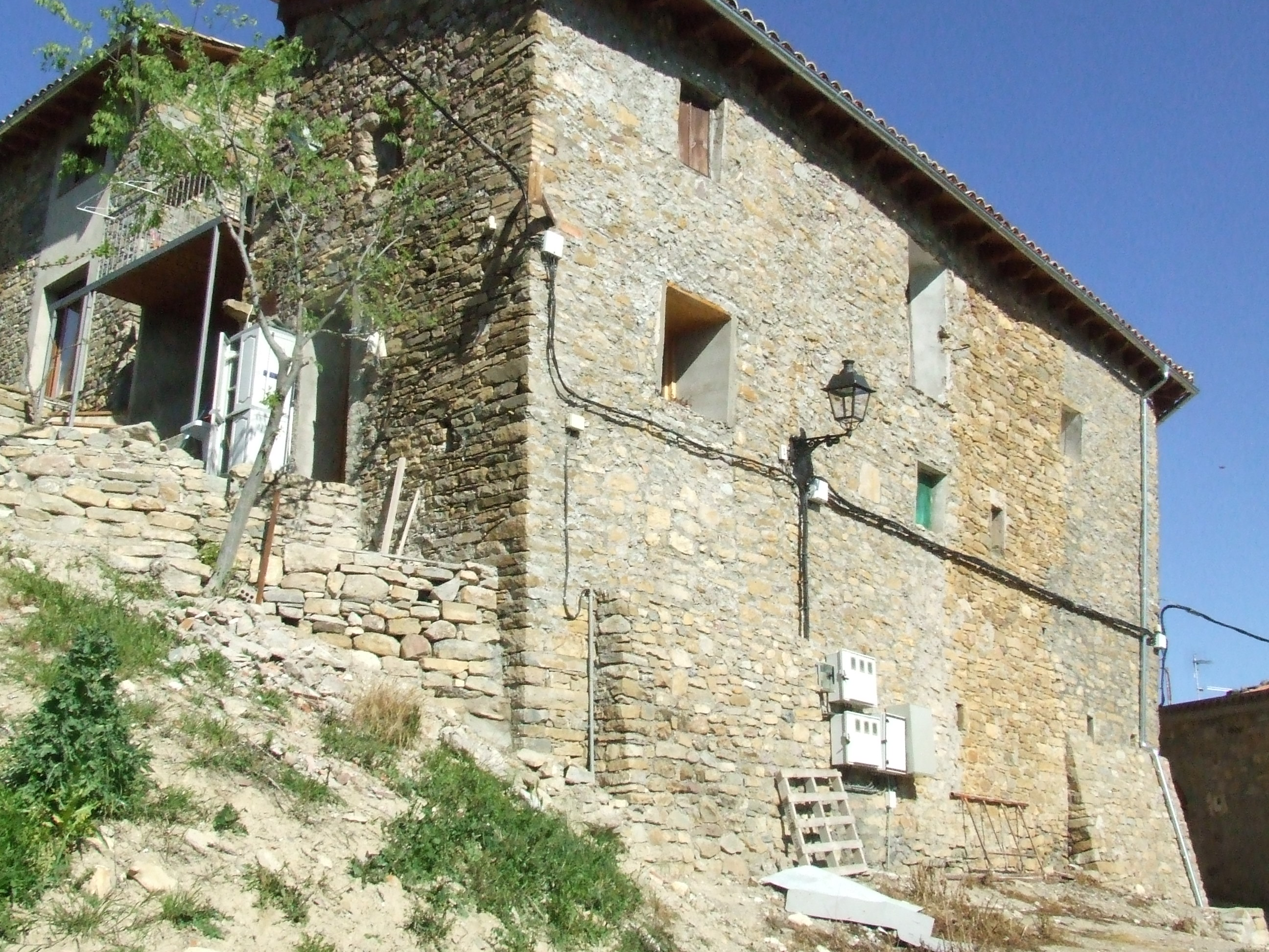 Casal de l'antic clos de Torallola (Toralla i Serradell, Conca de Dalt, Pallars Jussà)